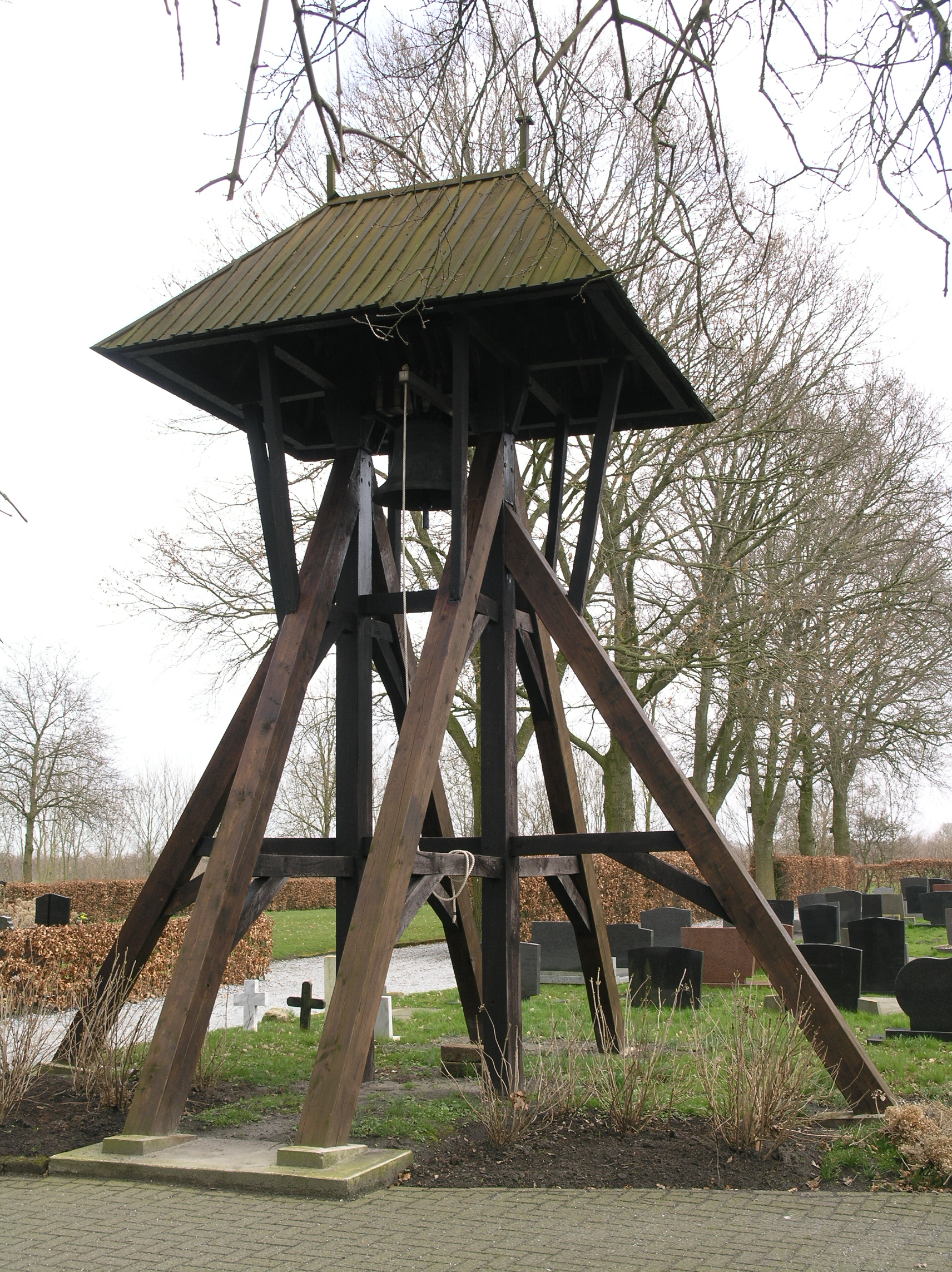 Drogeham Klokkenstoel